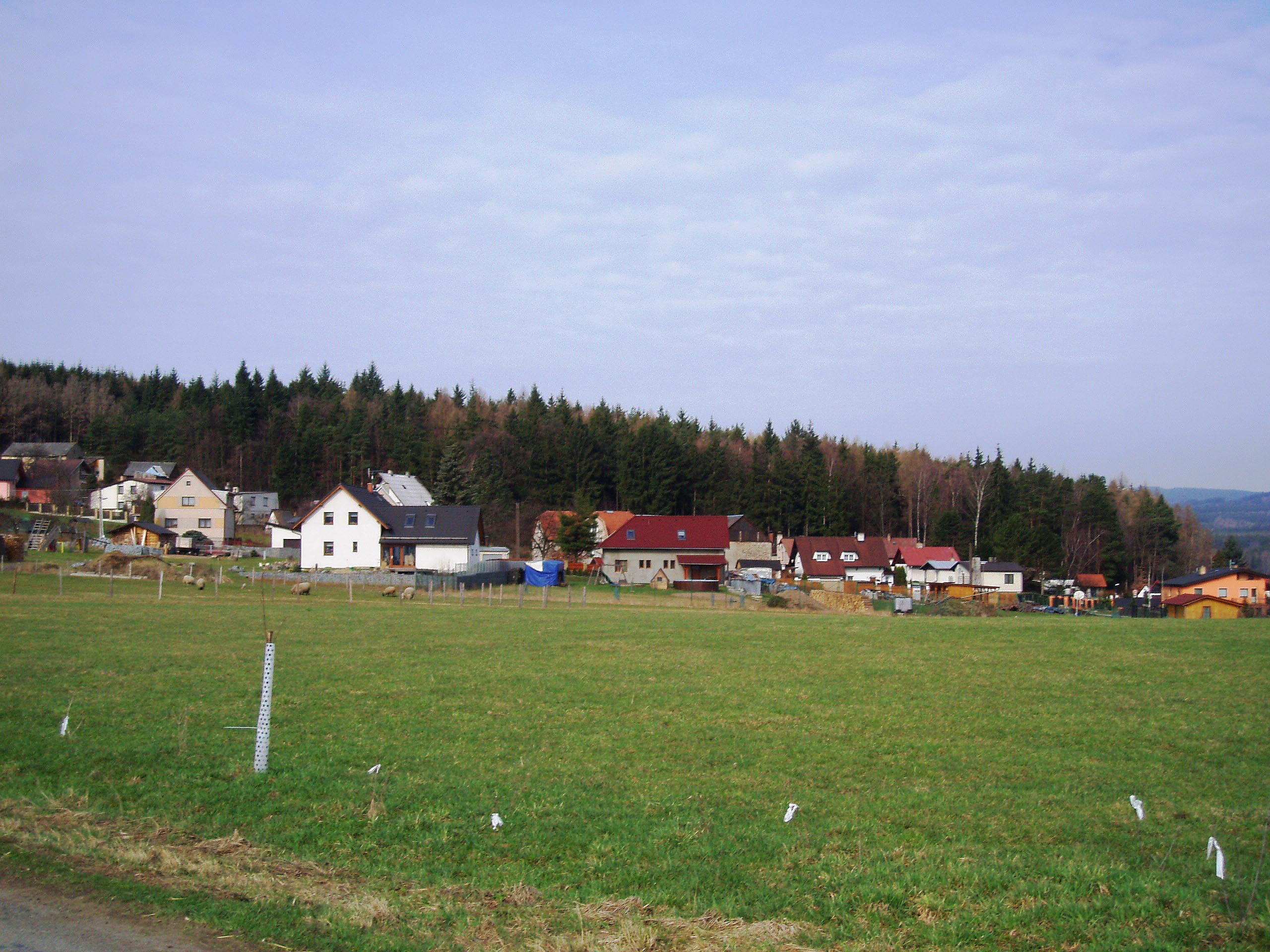 Tisová,celkový pohled